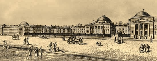 Accademia medico-chirurgica - San Pietroburgo. Incisione inizio XIX secolo